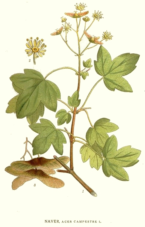 Original Description Naver, Acer campestre L.